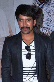 Dinesh Lal Yadav, Pakhi Hegde, Gulshan Grover at Smt Netaji film launch